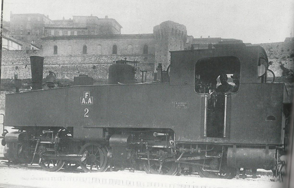 La Locomotiva N°2 a Fermo sotto collaudo, 1906